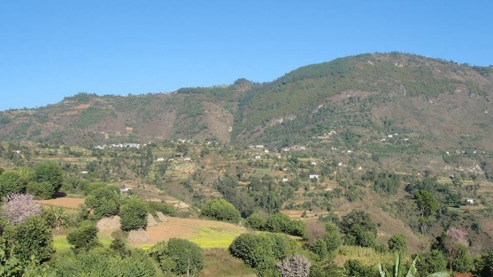 काभ्रेपलान्चोक जिल्लाको अतिरमणिय तिमालको काखमा रहेको कानपुर क्यापस